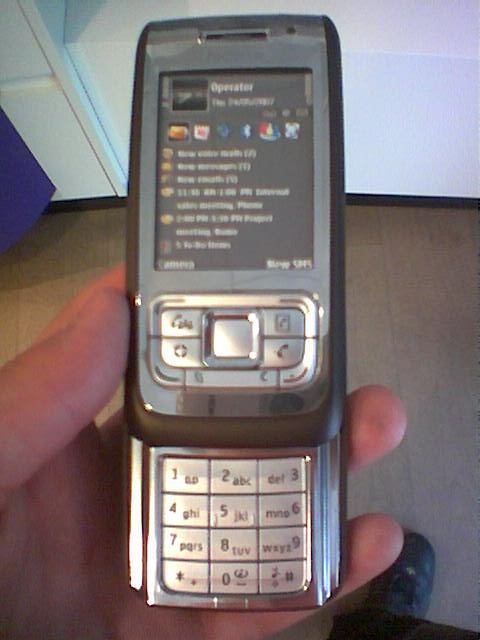 Photo d'un nokia E65